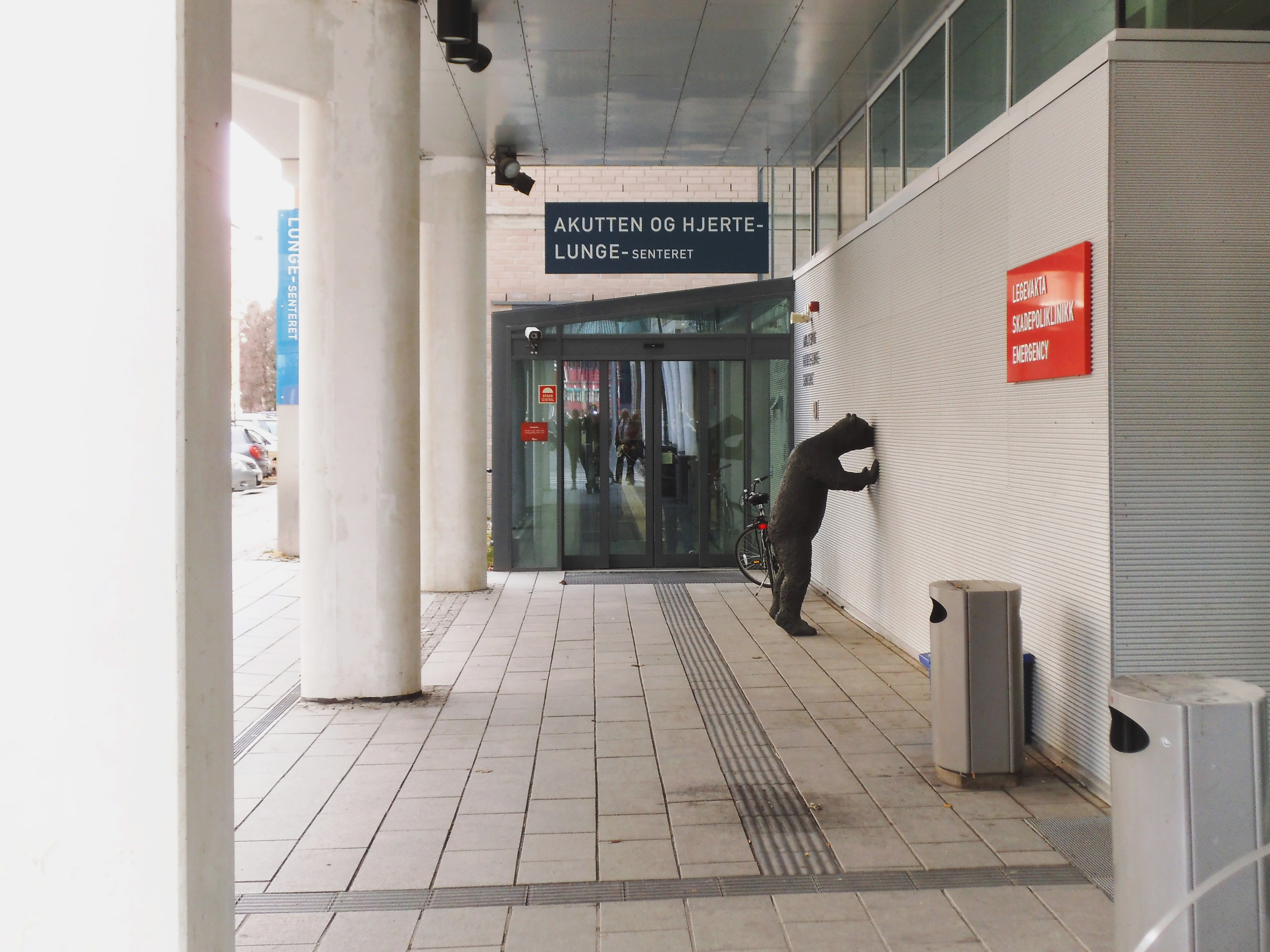 Inngangspartiet til AHL-senteret, det største av nybyggene ved St. Olavs. Åpnet i 2010.